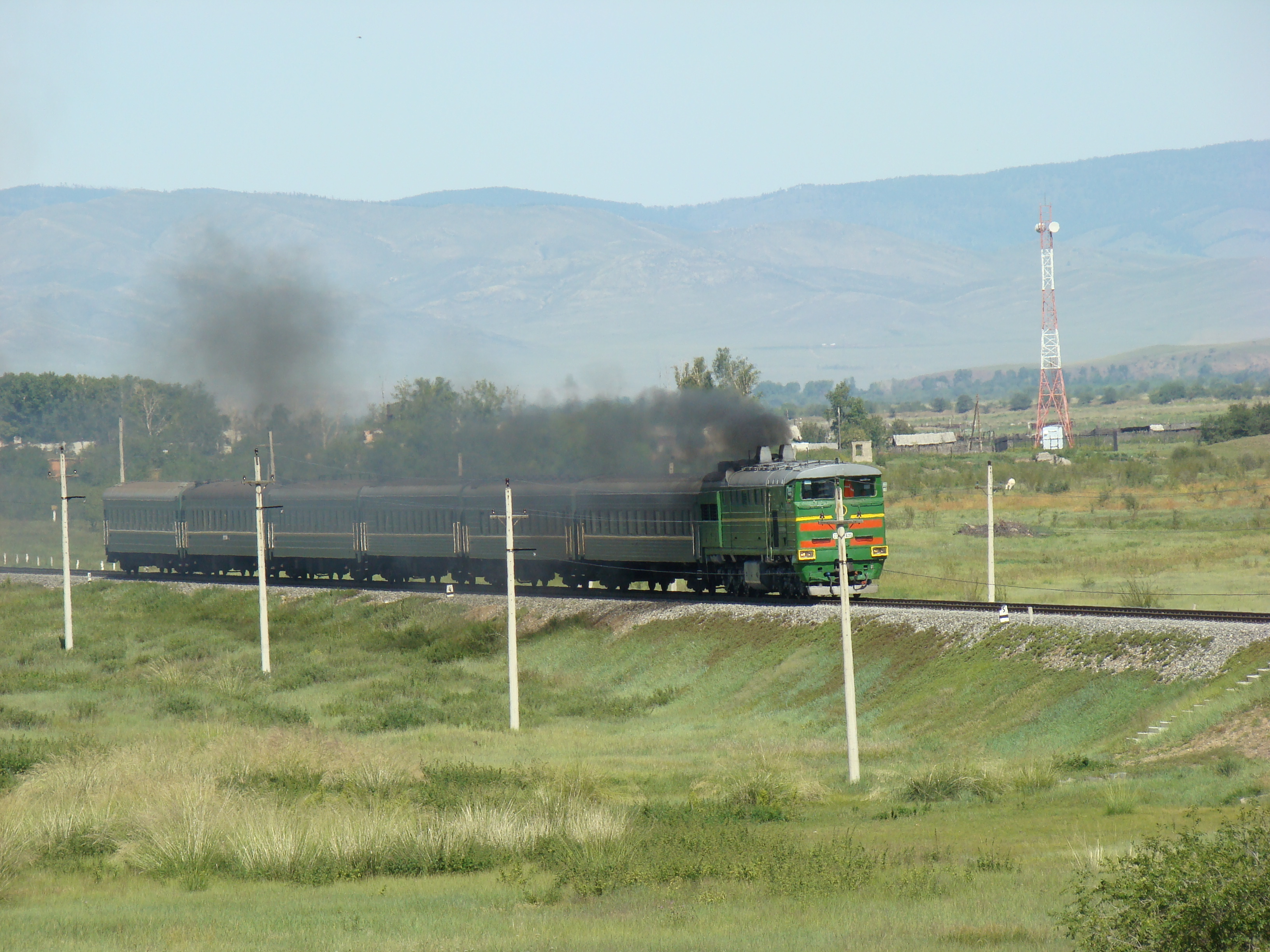 Vlak Irkutsk-Nauški v blízkosti stanice Chužir, Džidinský rajón, Burjatsko, Rusko